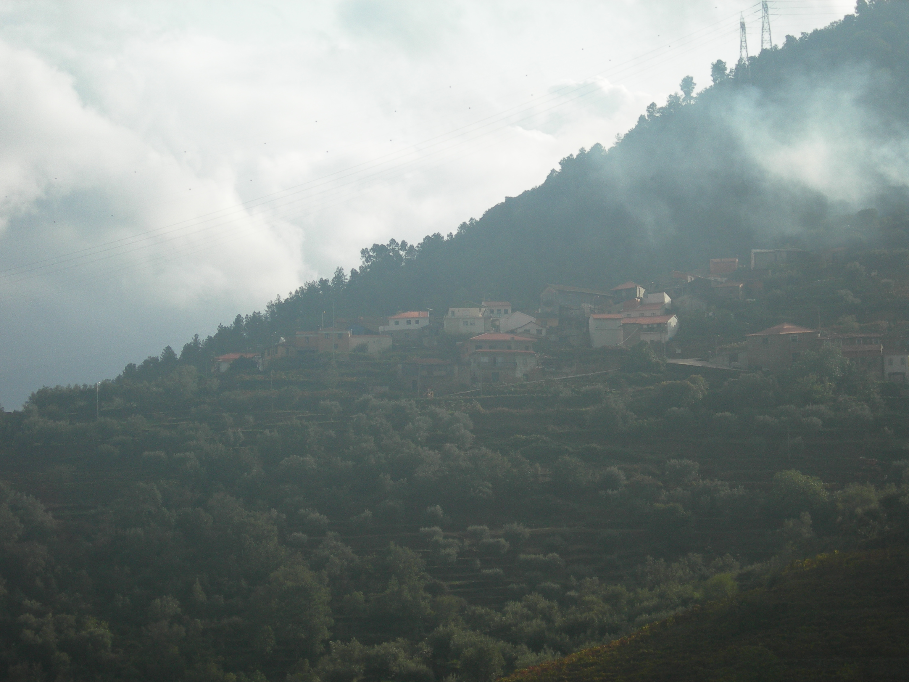 Fotografia de Santo Adriao